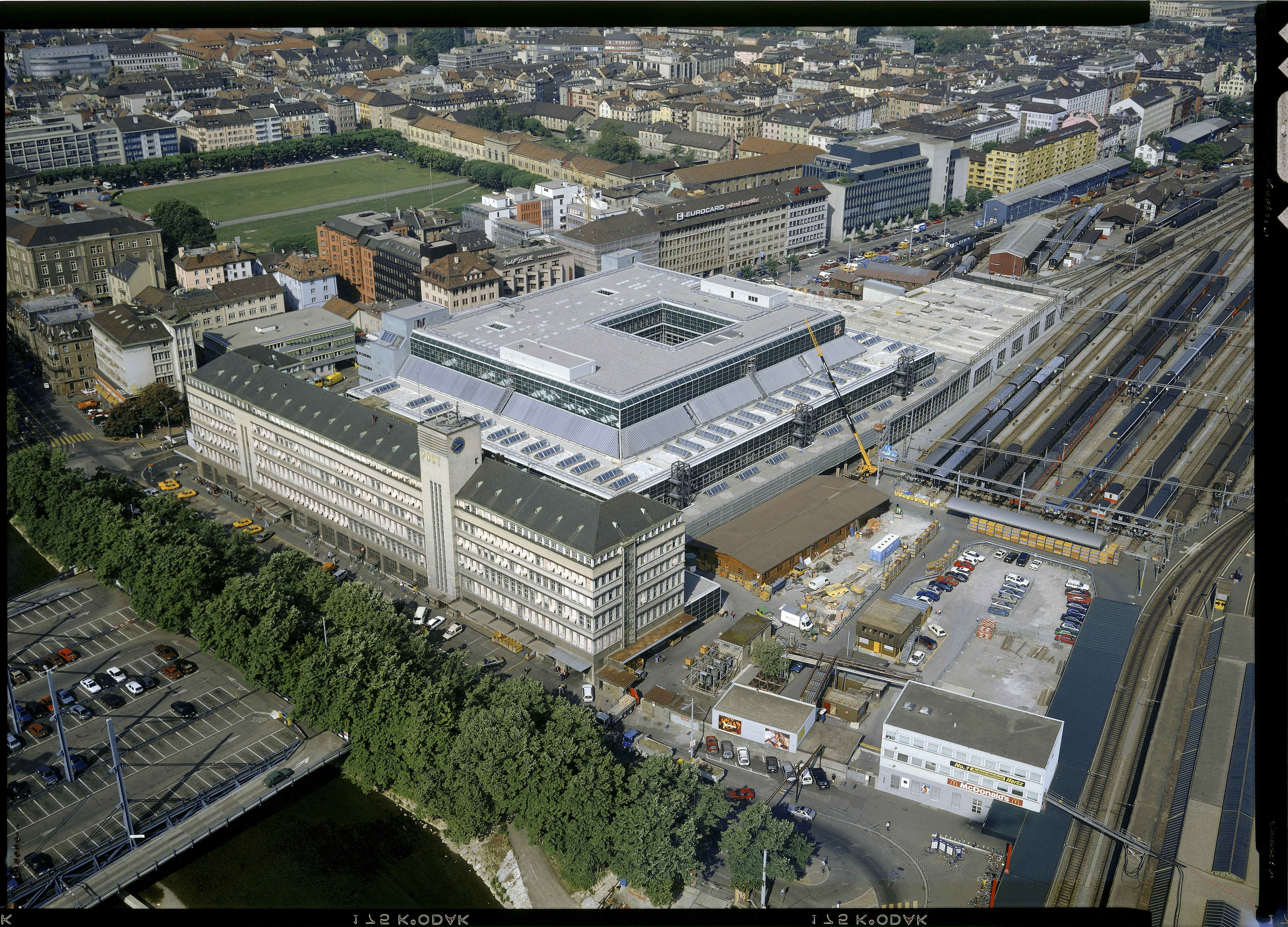 Luftbild der Sihlpost in Zürich. Mai 1992.